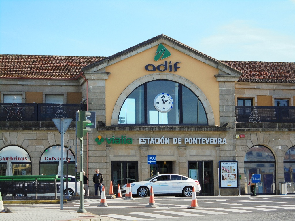 Estación de RENFE en Pontevedra capital